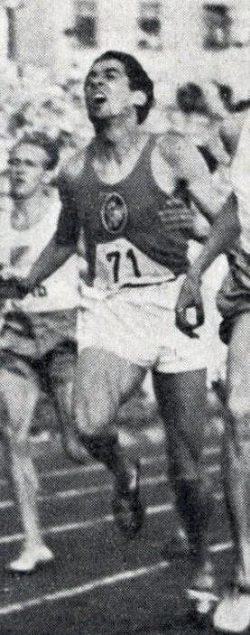 L'Athlétisme : organe officiel de la Fédération française d'athlétisme - 1er septembre 1946, p.3.- Marcel Hansenne, médaille de bronze aux championnats d'Europe en 1946, à Oslo.